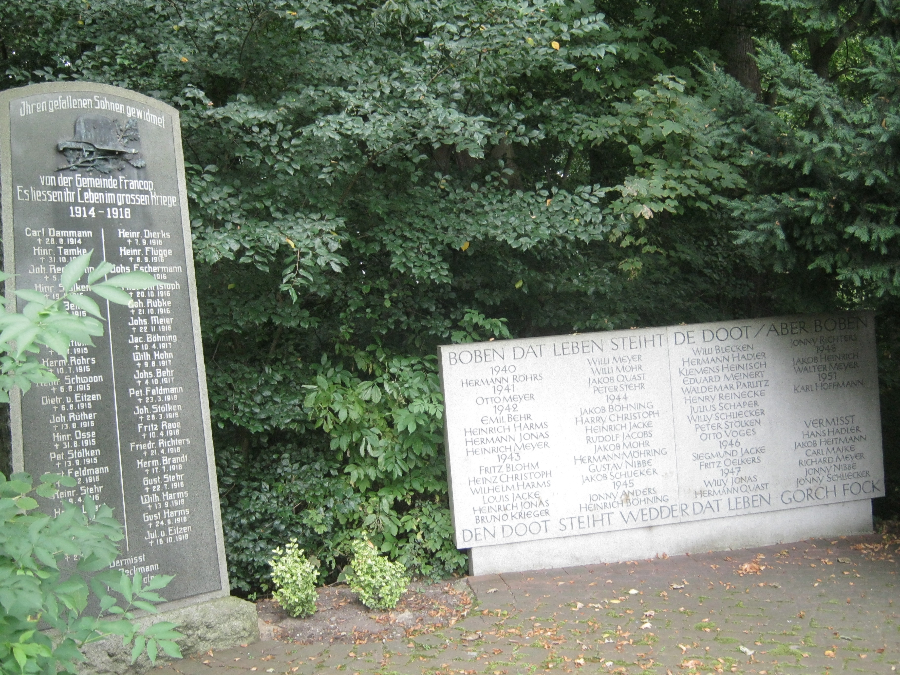 Gedenkstein für die Gefallenen des Ersten Weltkrieges in Hamburg-Francop am Gutsbrack.